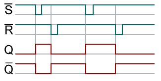 Impulsdiagramm eines RS-Flipflops in negativer Logik